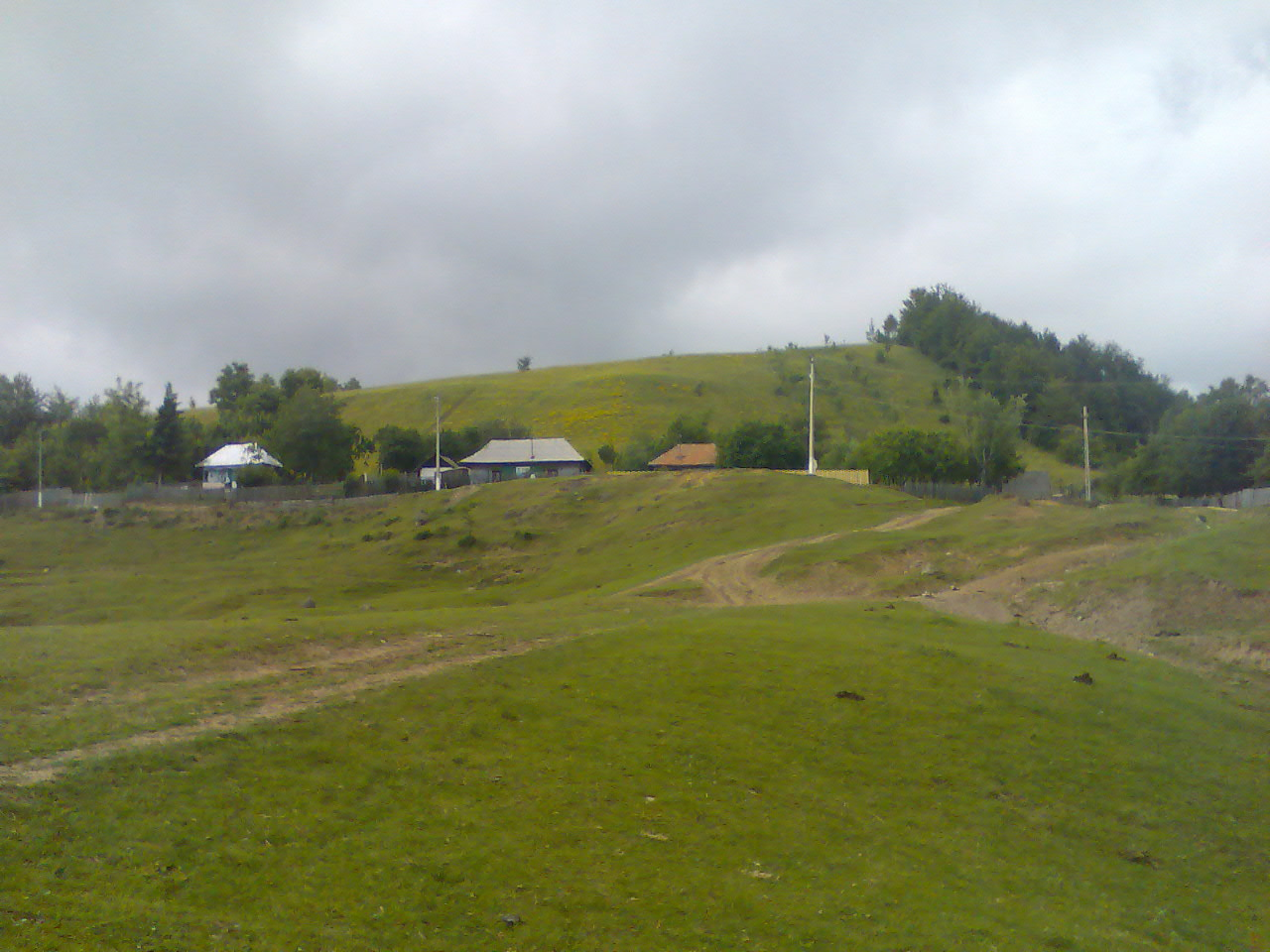 Varful Galmii